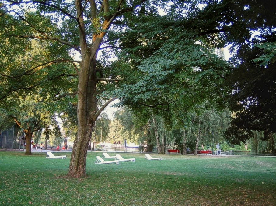 Berlin-Spandau, Wröhmännerpark. Liegewiese.